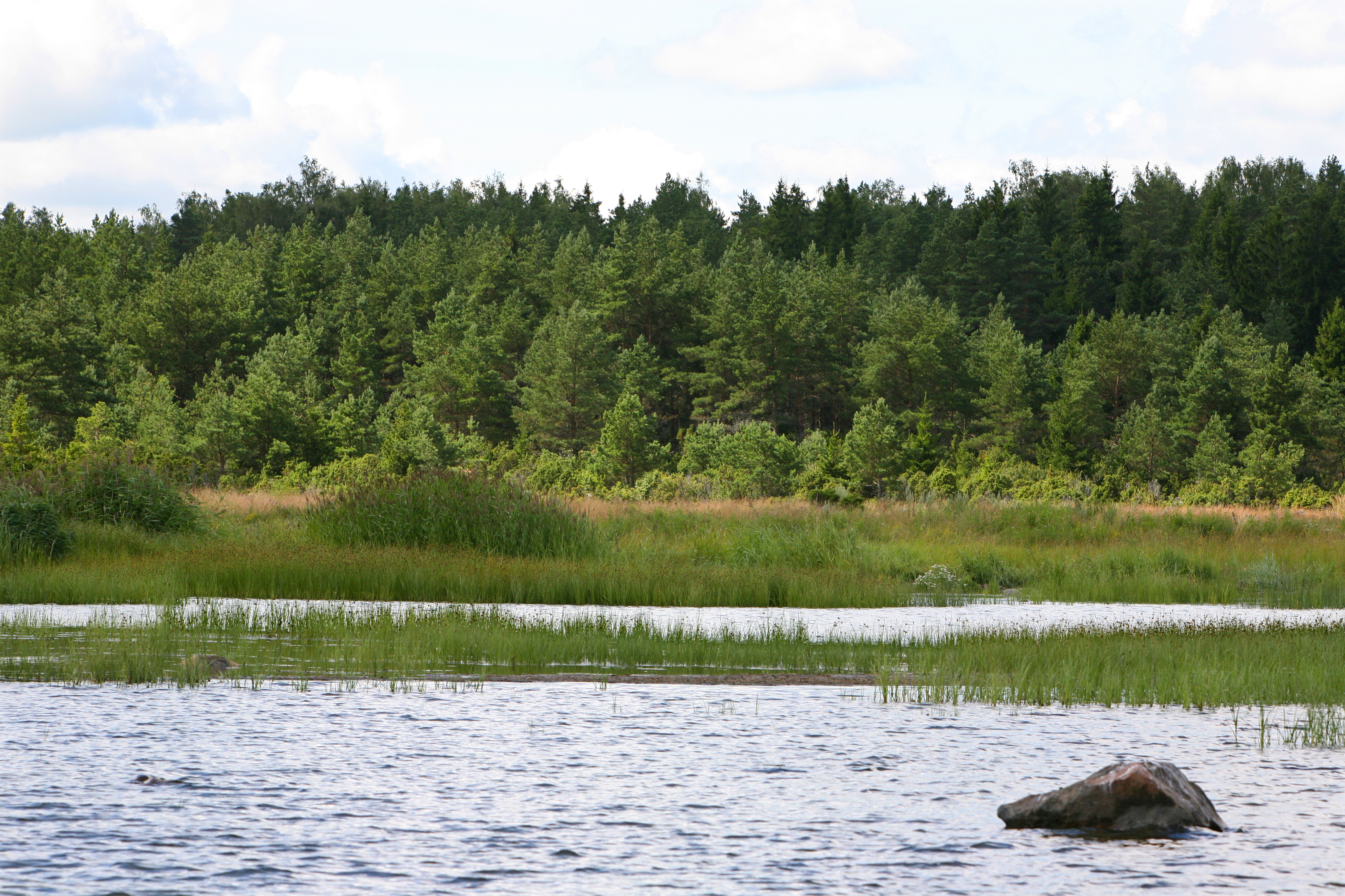 Vohilaid